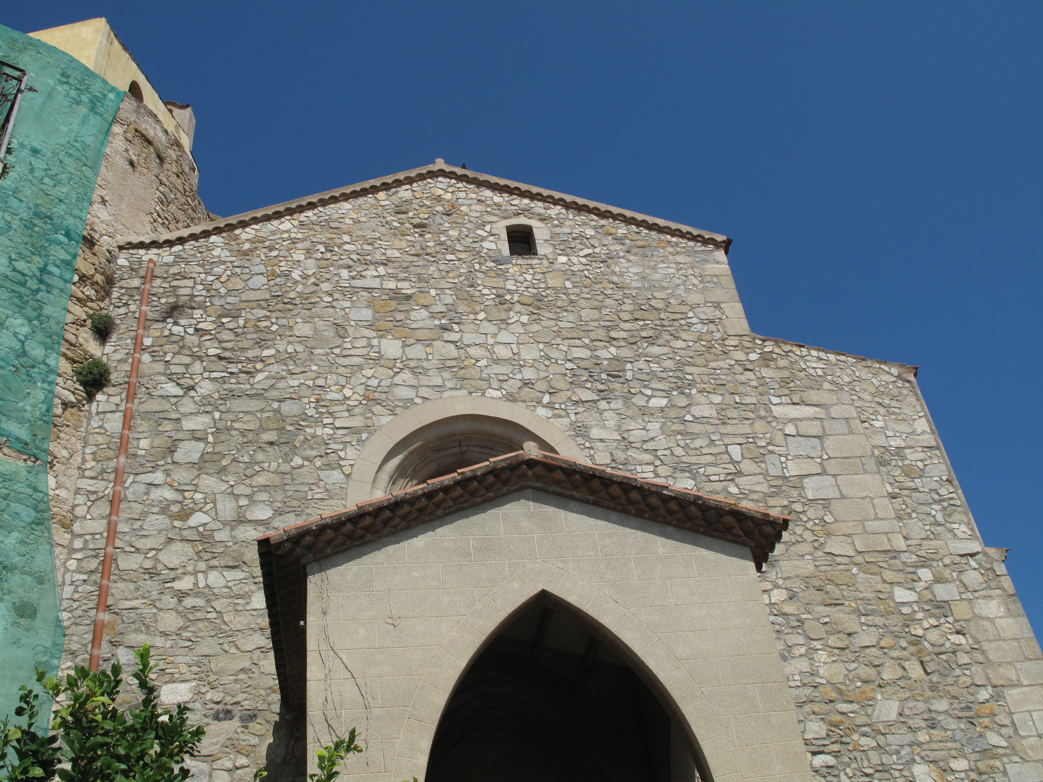 Església parroquial de Sant Jaume i torre de defensa (Sant Pol de Mar)